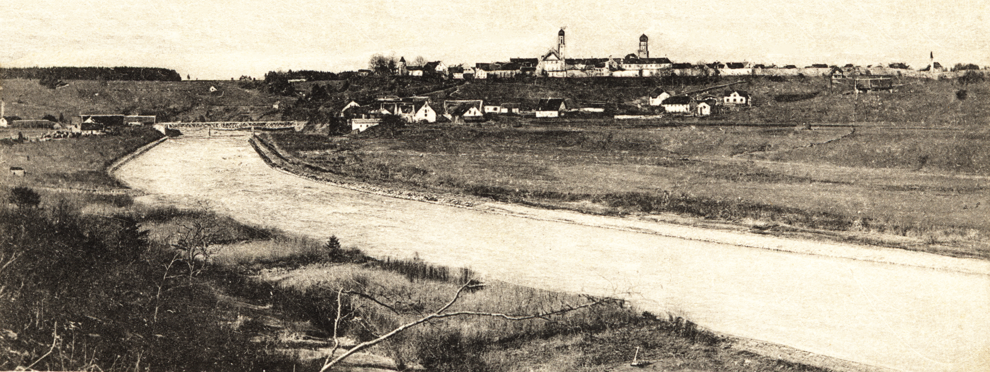 Der Lech vor Errichtung der Staustufen flussabwärts von dem im Hintergrund sichtbaren Schongau. Ansichtskarte, 1905.